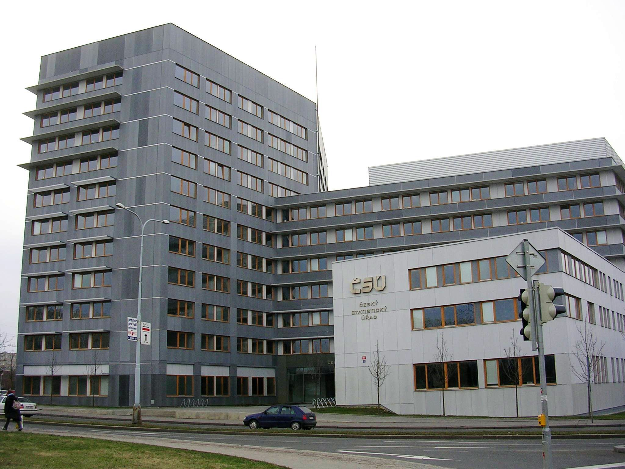 Praha, Strašnice, Český statistický úřad (v ulici Na Padesátém)